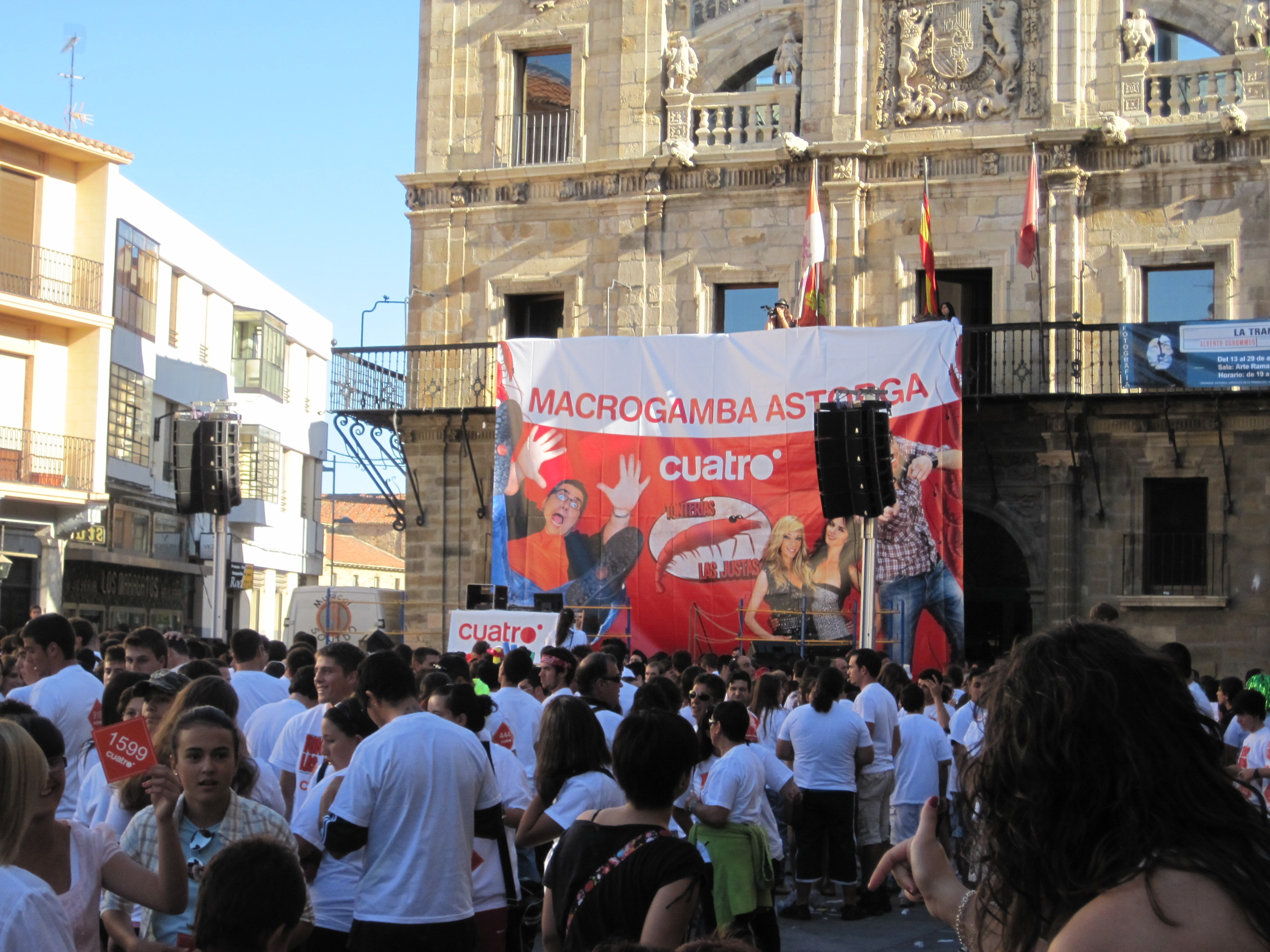 Momentos previos a la "macrogamba" del programa "Tonterías las justas" celebrada en Astorga (León, España) en agosto de 2010.